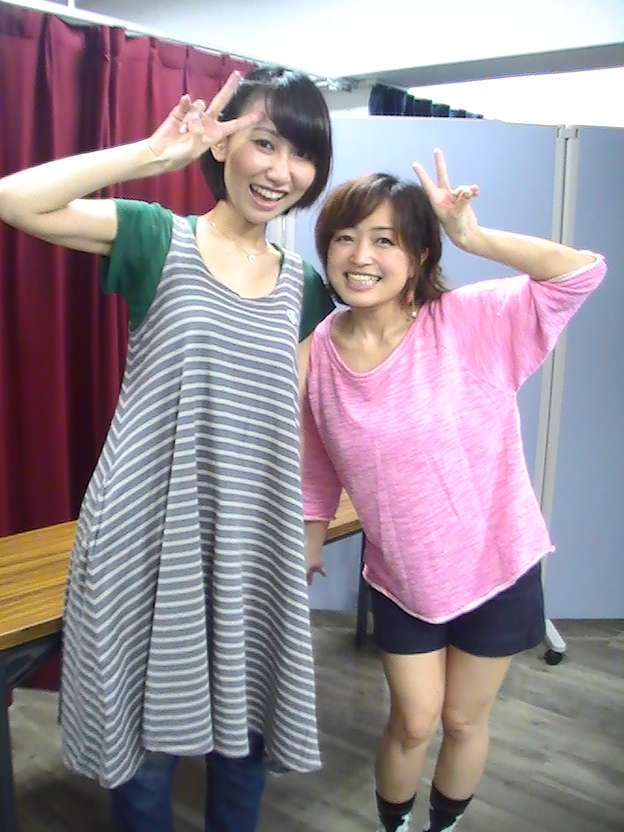 姫くり (2017年4月29日)